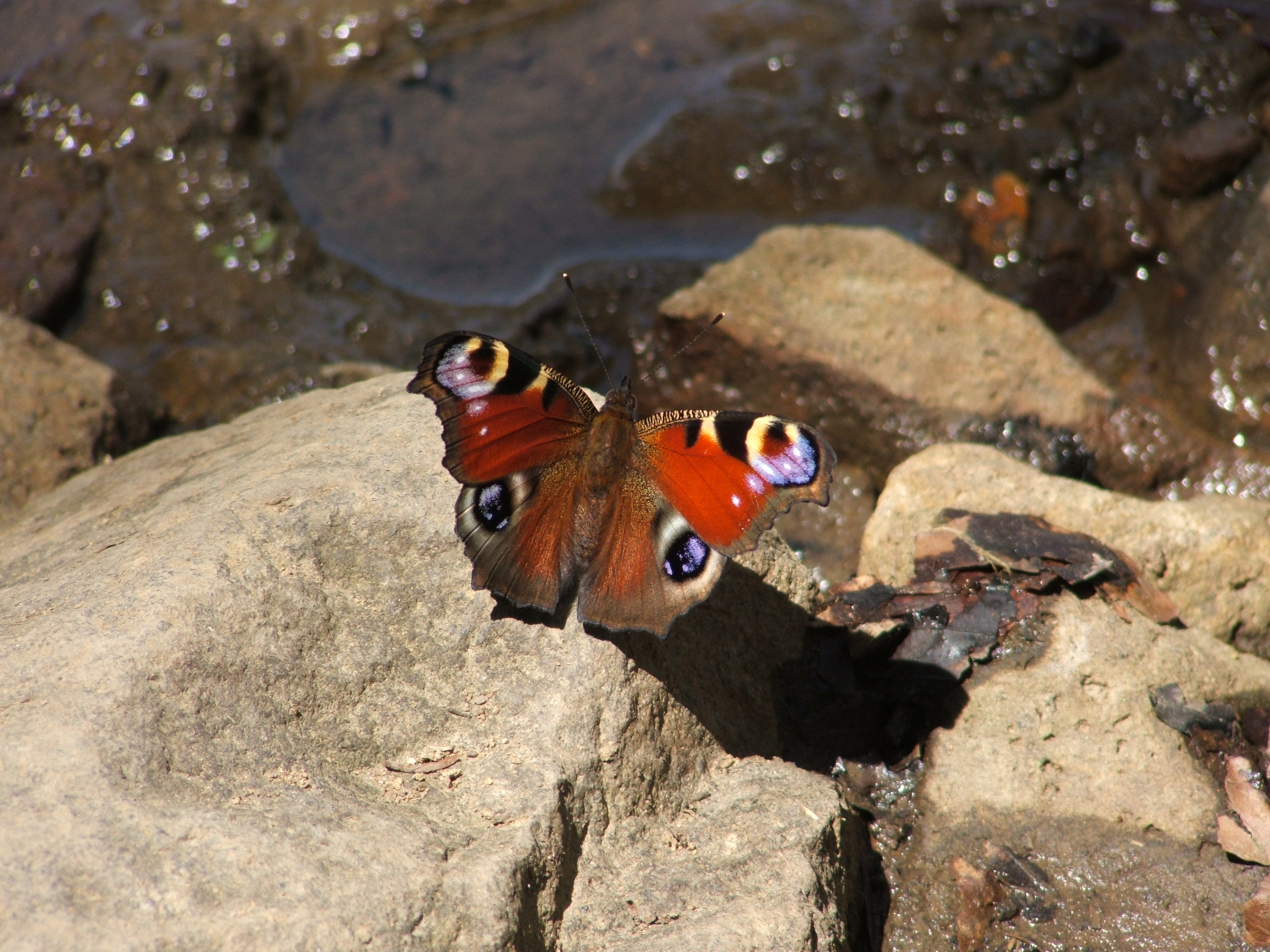 Nappali pávaszem (Aglais io) a Mátrában